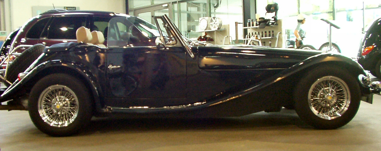 Verona Cabrio Seitenansicht